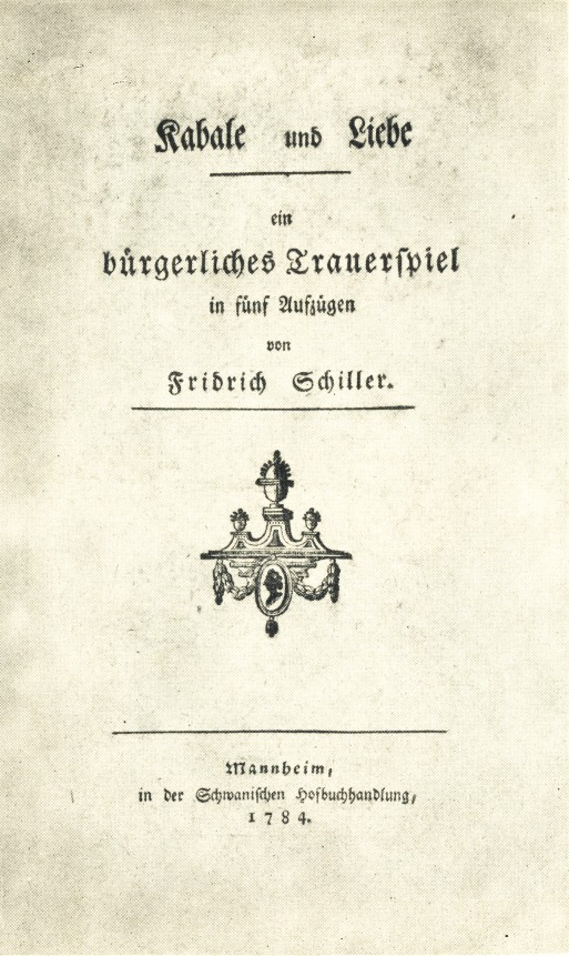 Titelblatt der Erstausgabe von Friedrich Schillers Kabale und Liebe 1784